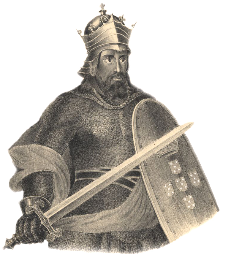 Afonso Henriques (Afonso I; 1109-1185), primeiro rei de Portugal.